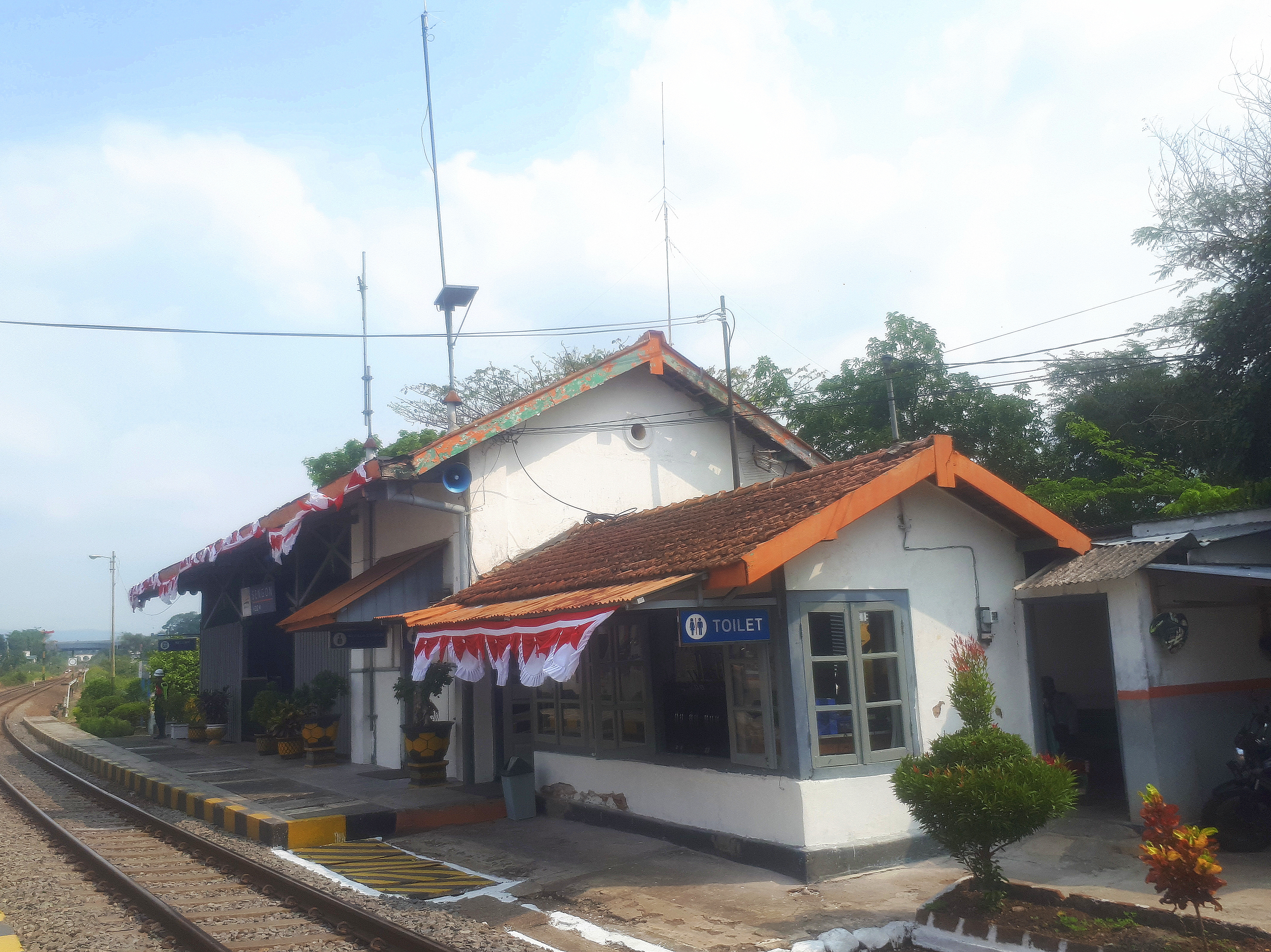 Tampak luar Stasiun Sengon, stasiun paling selatan di Kabupaten Pasuruan, Jawa Timur, lintas Bangil-Blitar-Kertosono